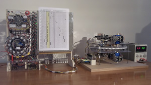 Machine de Turing.